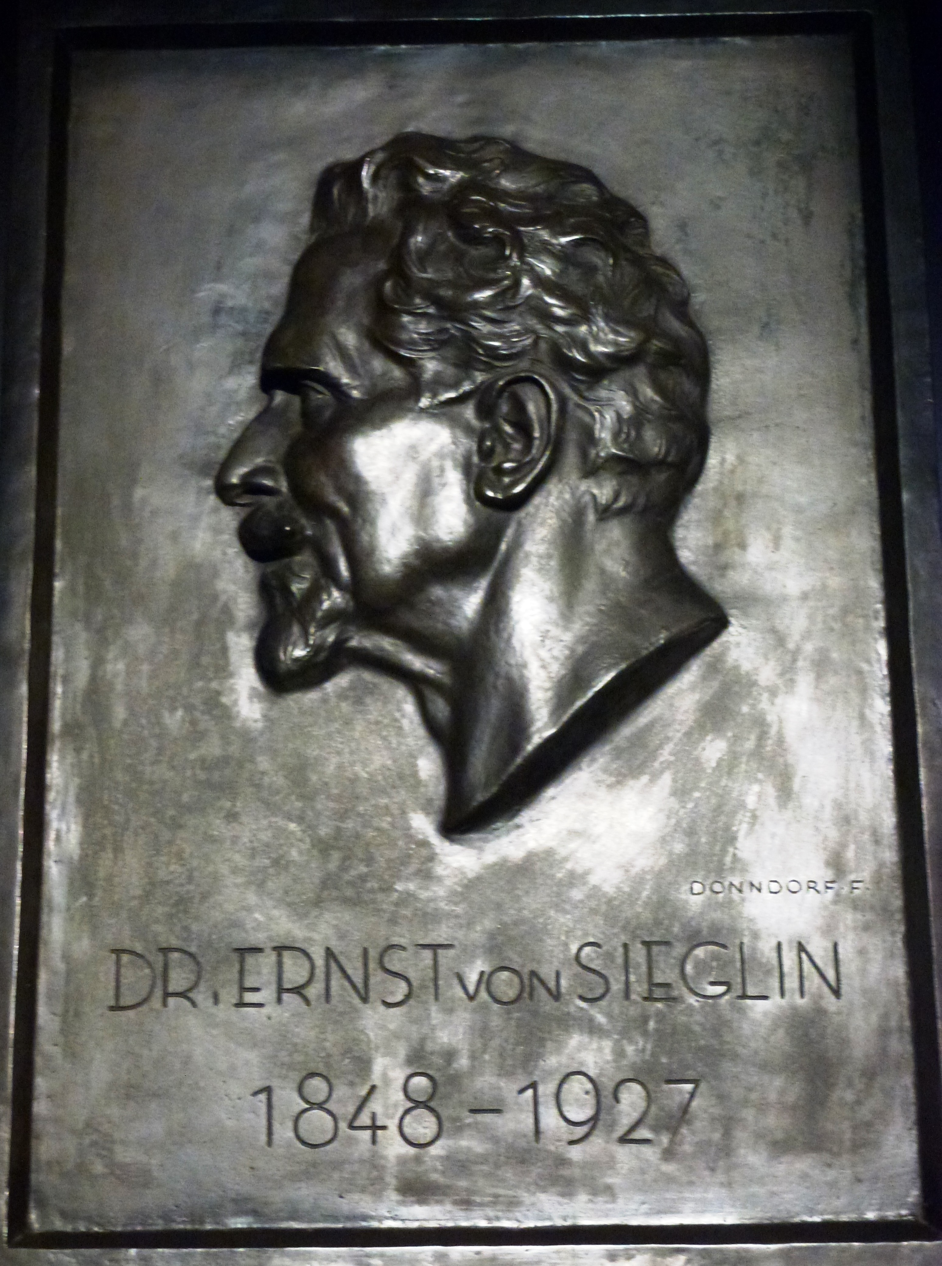 Beschreibung siehe: File:Baden-Württemberg, Stuttgart, Landesmuseum Württemberg NIK 1378.JPG.